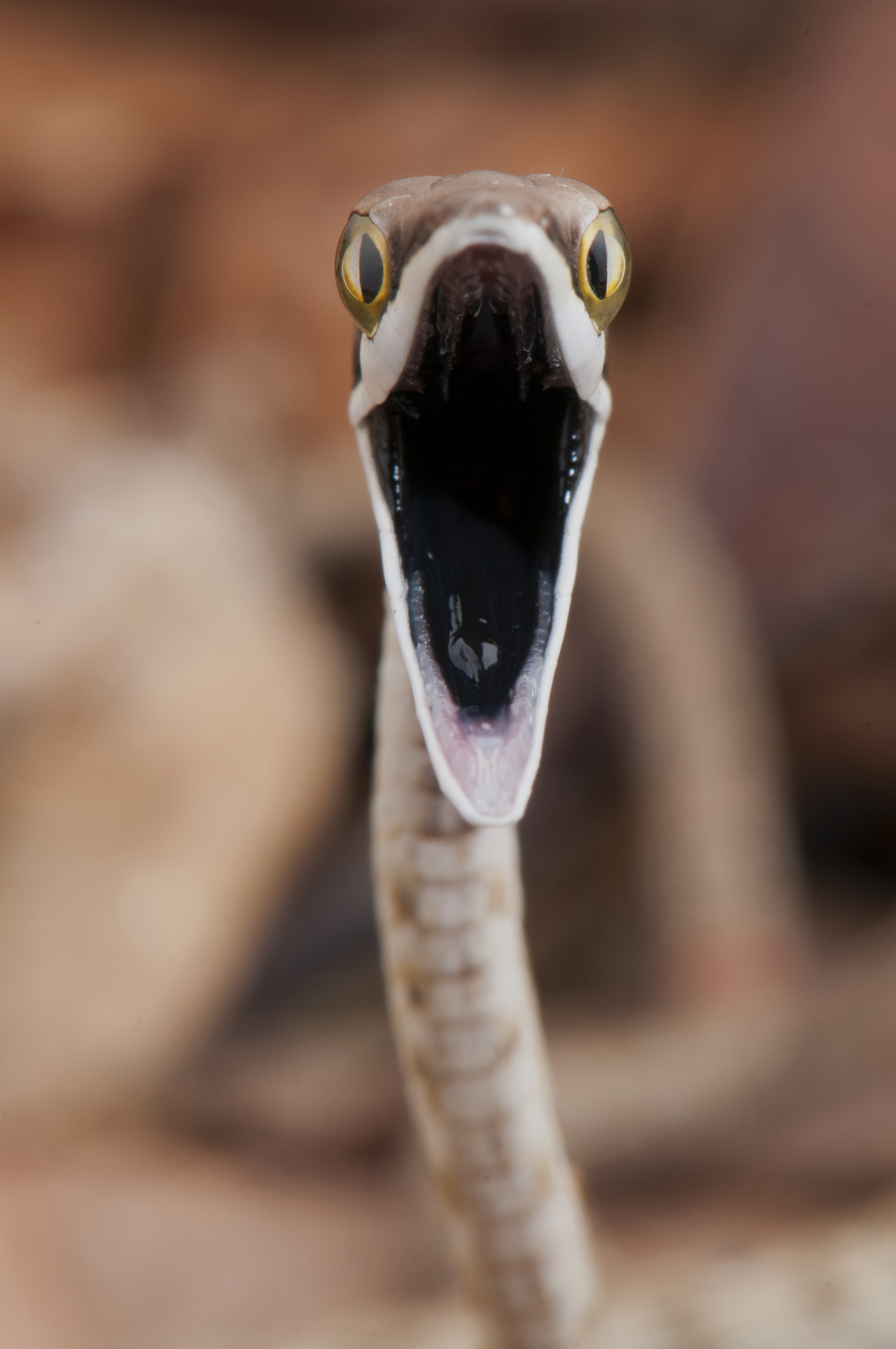 Indivíduo abrindo a boca e exibindo a mucosa negra para intimidar os predadores.